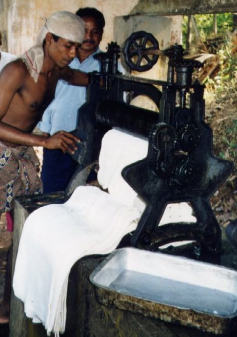 India rubber production in Goa (province of Salcete) Výroba kaučuku v Goe (Salcete, zázemí) photo: -jkb- 2000/2001